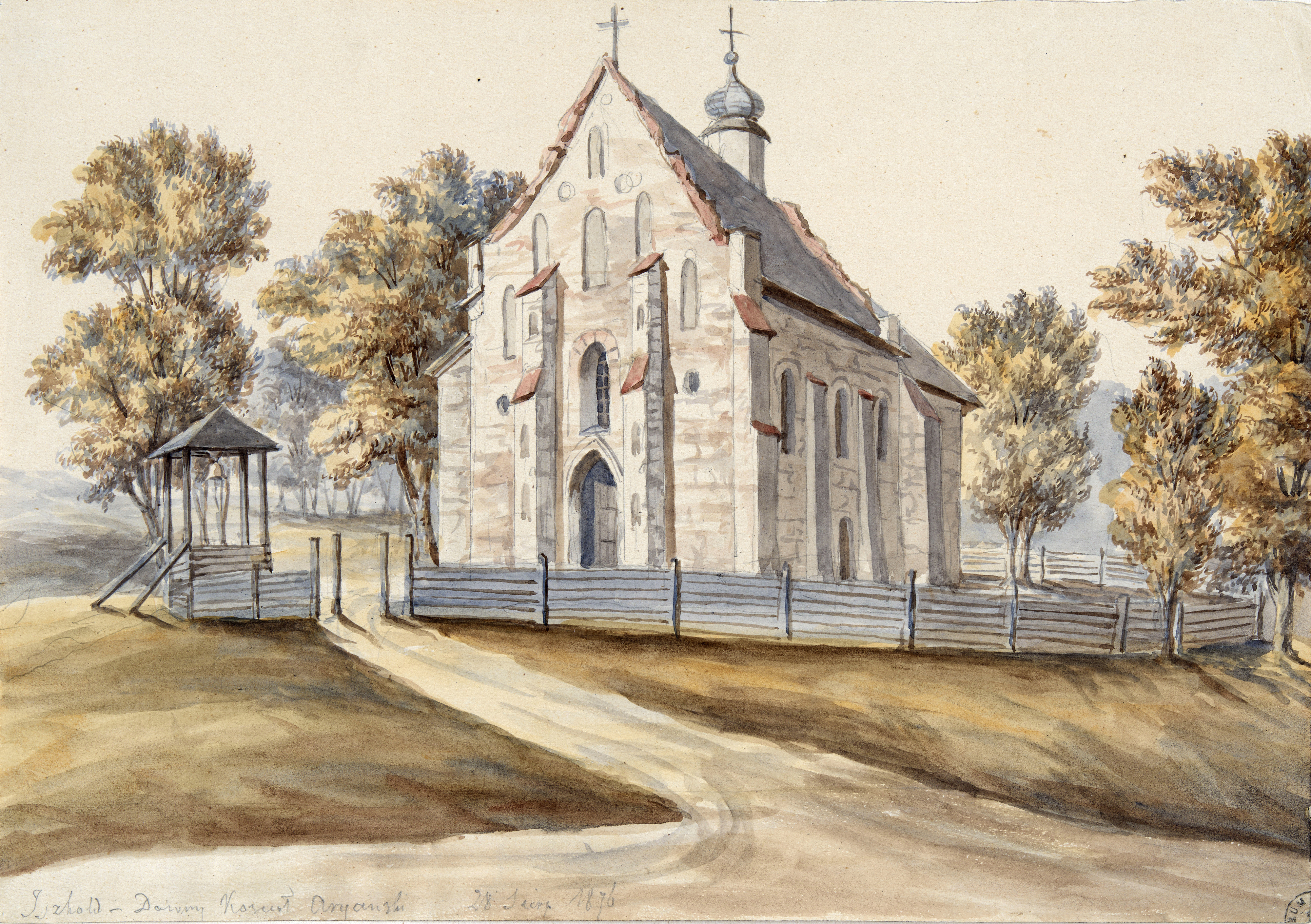 Беларуская (тарашкевіца): Ішкальдзь (Iškaldź). Касьцёл Найсьвяцейшай Тройцы